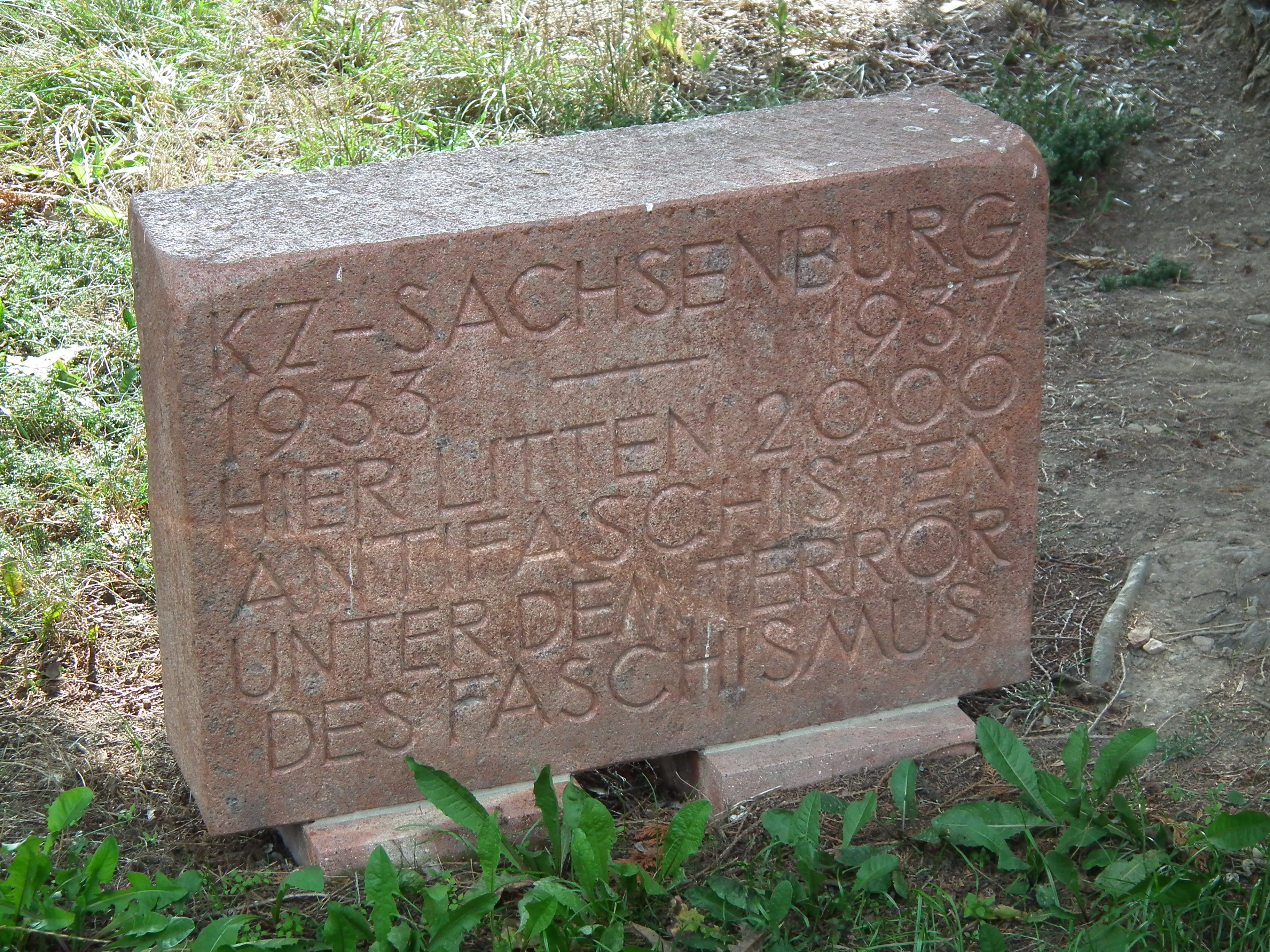 Sachsenburg